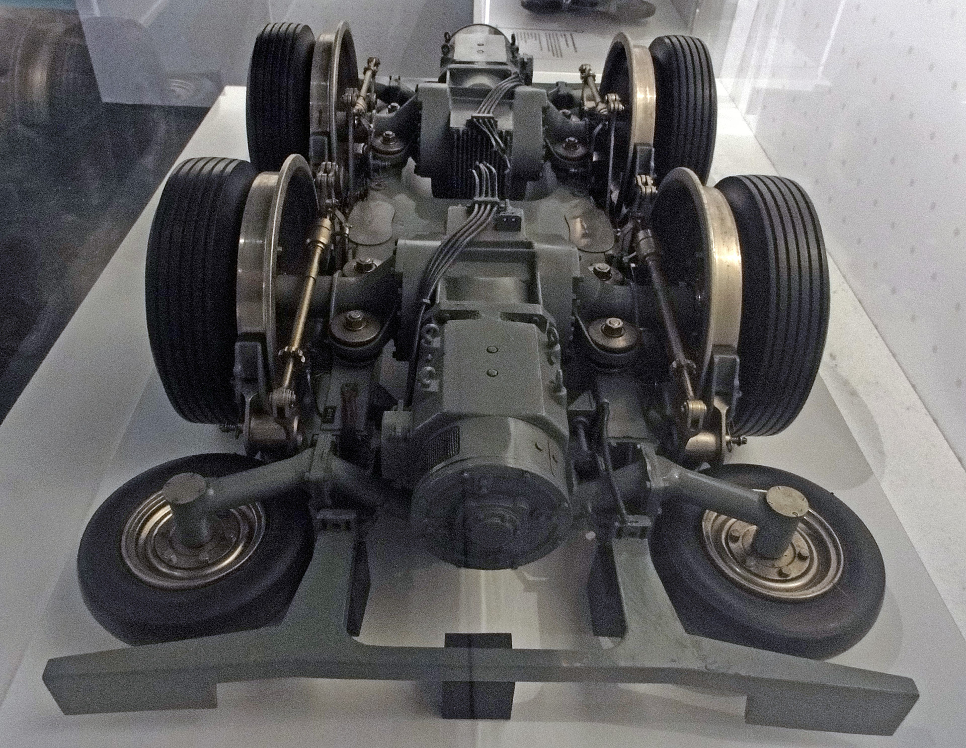 Bogie de MP 55 du métro de Paris, France.